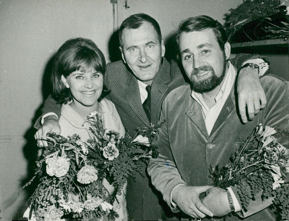 Införd i Svenska Dagbladet 1965-09-13 sid 12 ( med bildtexten: "Slut för i år, signalerade Hagge Geigert och stängde på söndagskvällen "Sommar-Stockholm" på scenen i Kungsträdgården efter – oväntat nog – rekordfin säsong med 16 regnfria söndagsprogram. I finalprogrammet medverkade bl.a. Barbro Skinnar och Cornelis Vreeswijk, vilka på bilden här ovan avskedskramas av regissören Geigert."